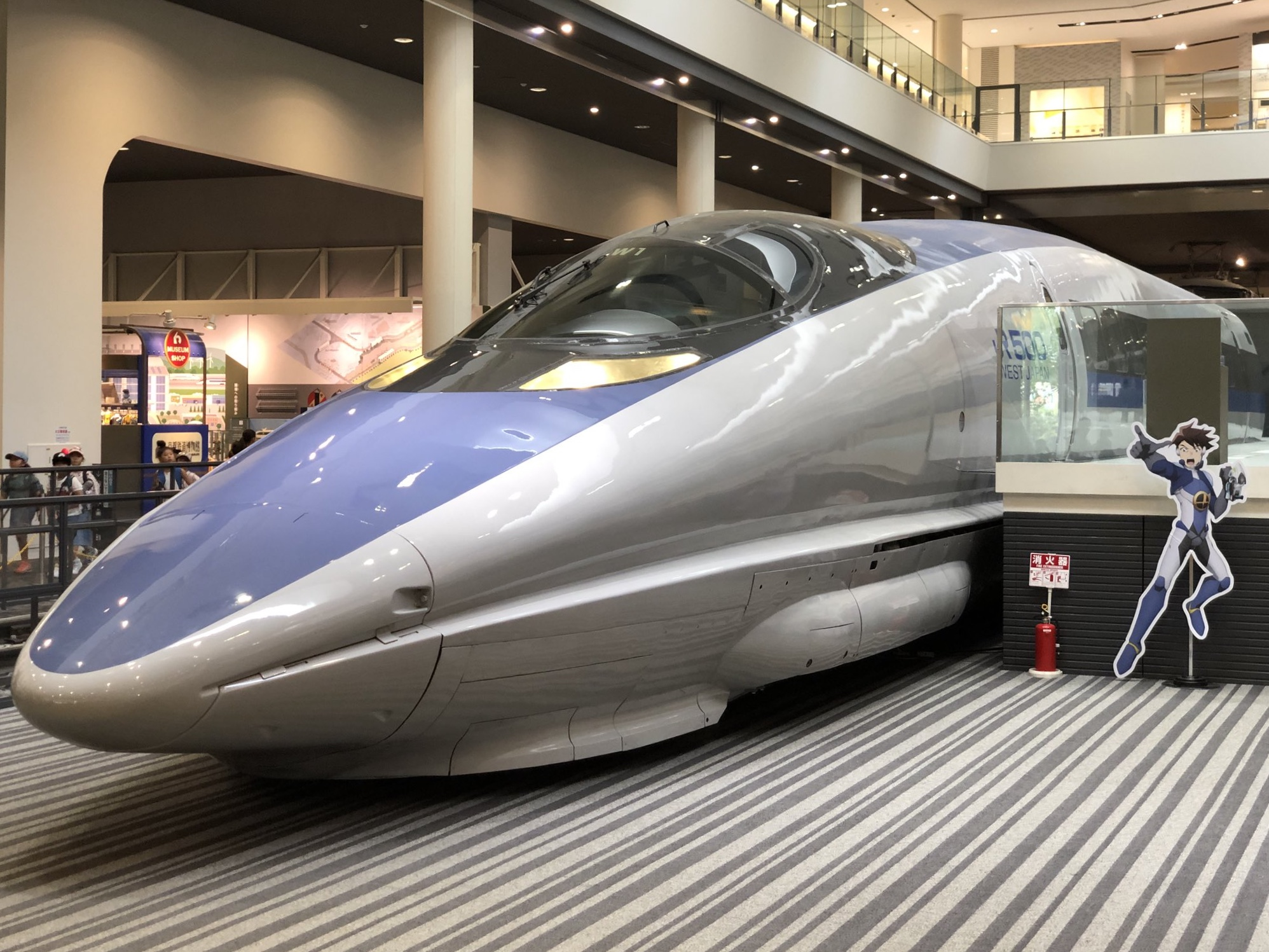 京都鉄道博物館にある500系新幹線W1編成1号車521-1